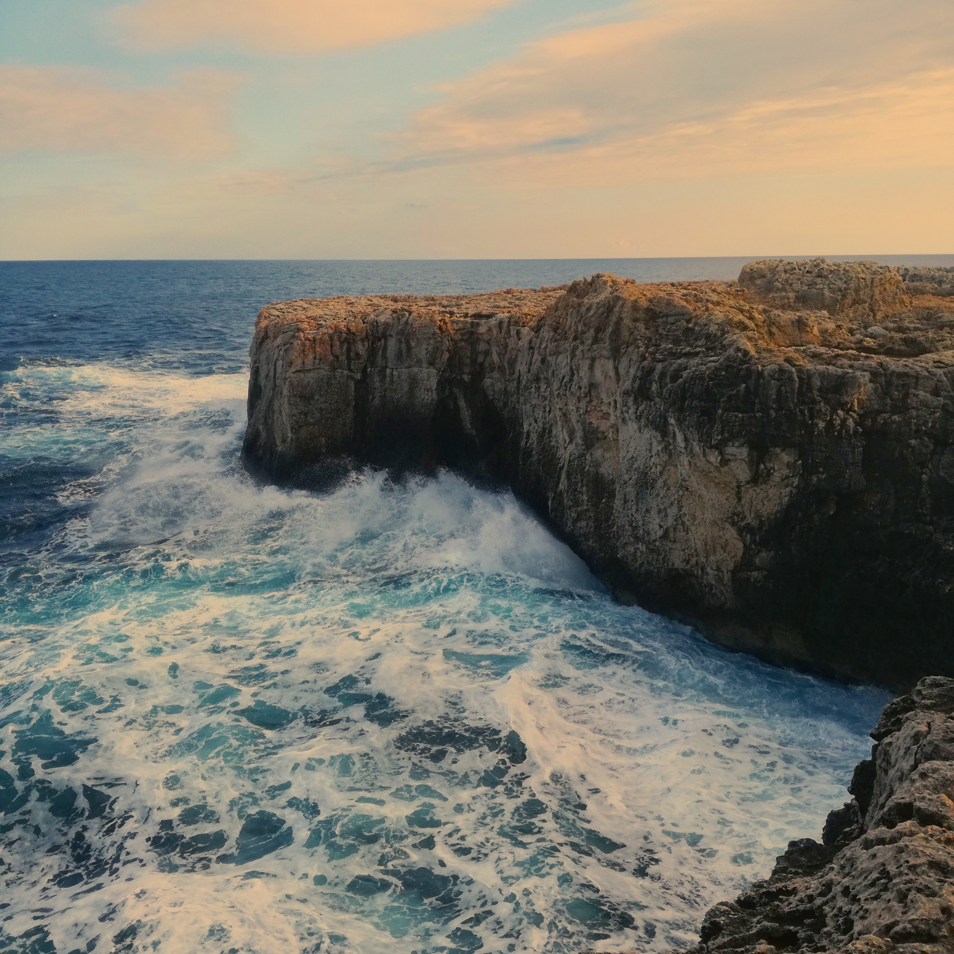 Area marina protetta Plemmirio (Q3622014)